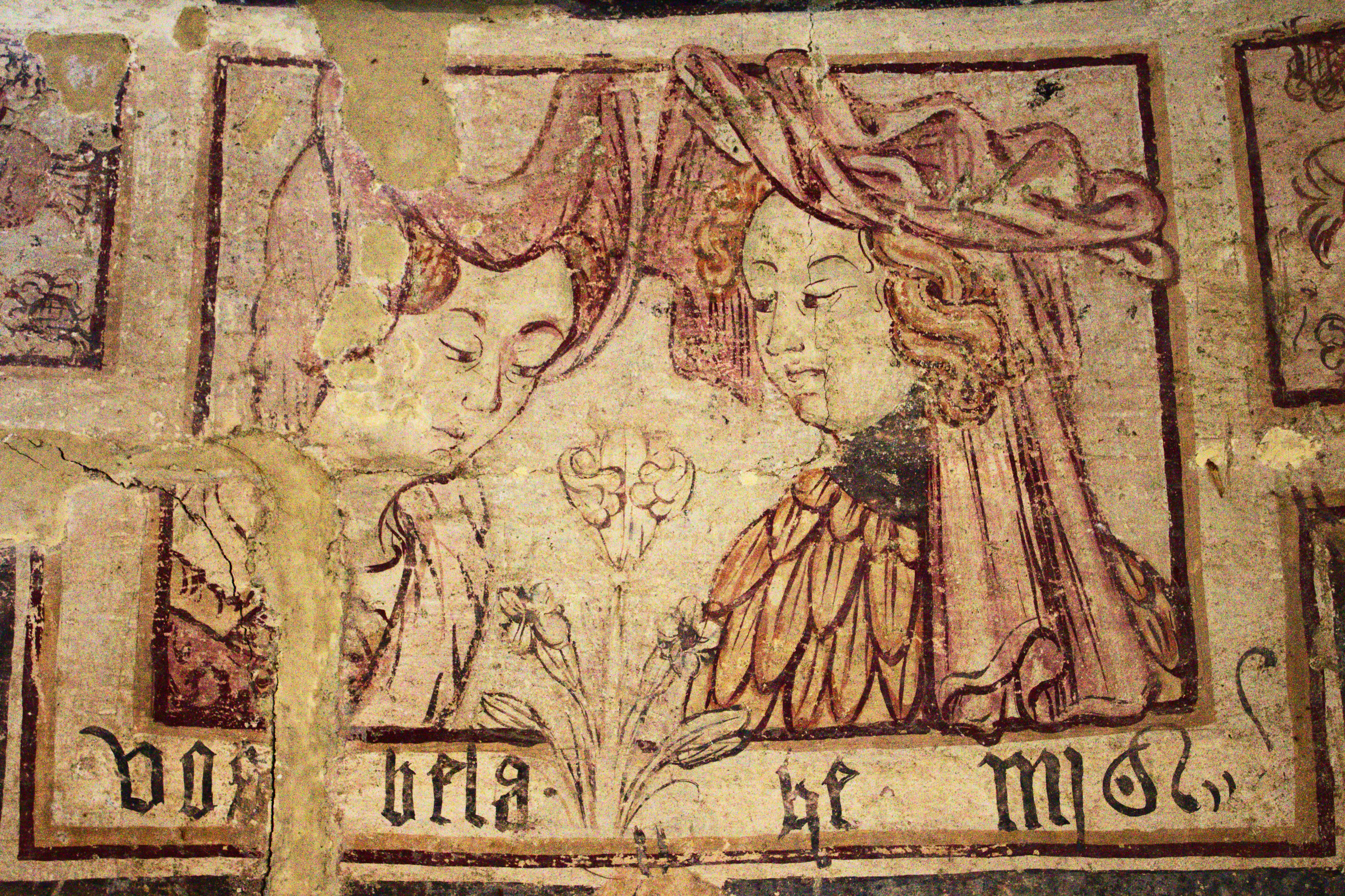 Un dos motivos centrais das pinturas da Igrexa de Vilar de Donas (Palas de Rei).